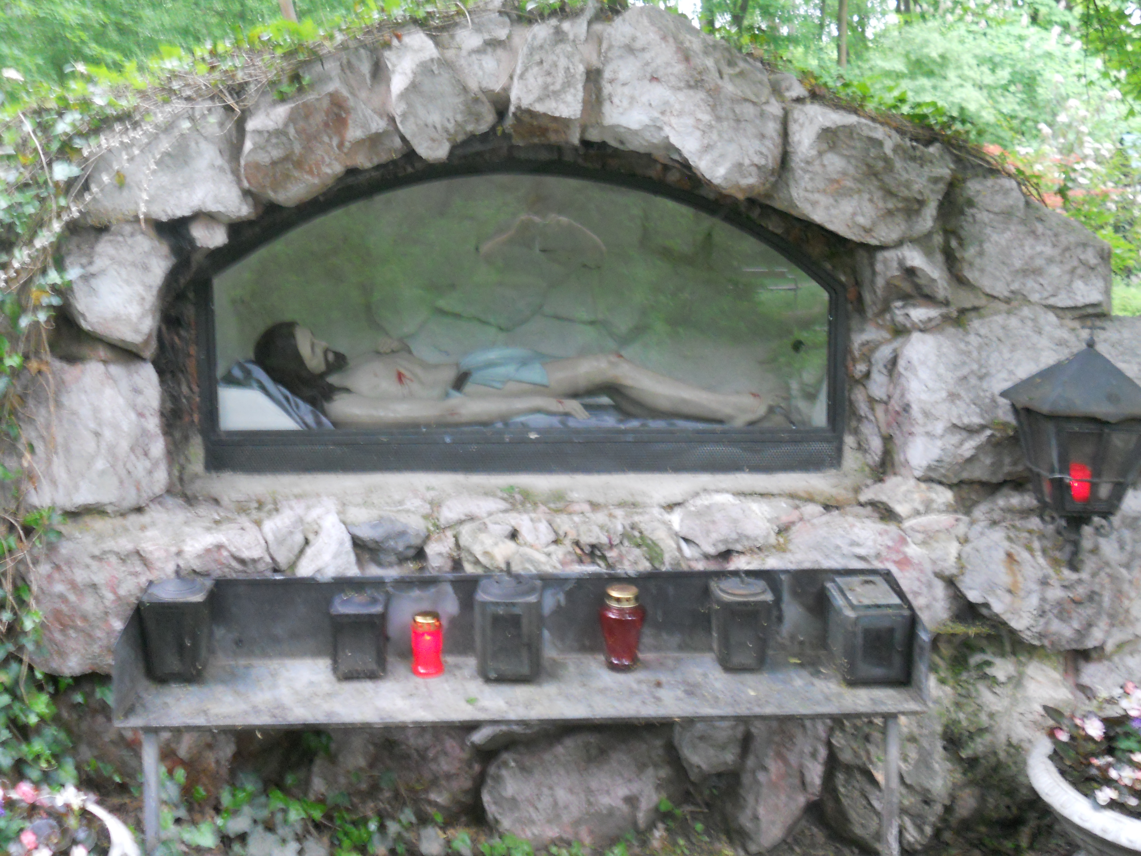 Heiliges Grab bei Maria Grün